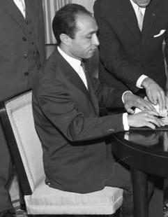 Unterzeichnung eines deutsch-marrokan. Luftfahrtsabkommens im Ausw. Amt. Staatssekretär Rolf Lahr [rechts] - marrokan. Botschafter Ahmed Osman [links]